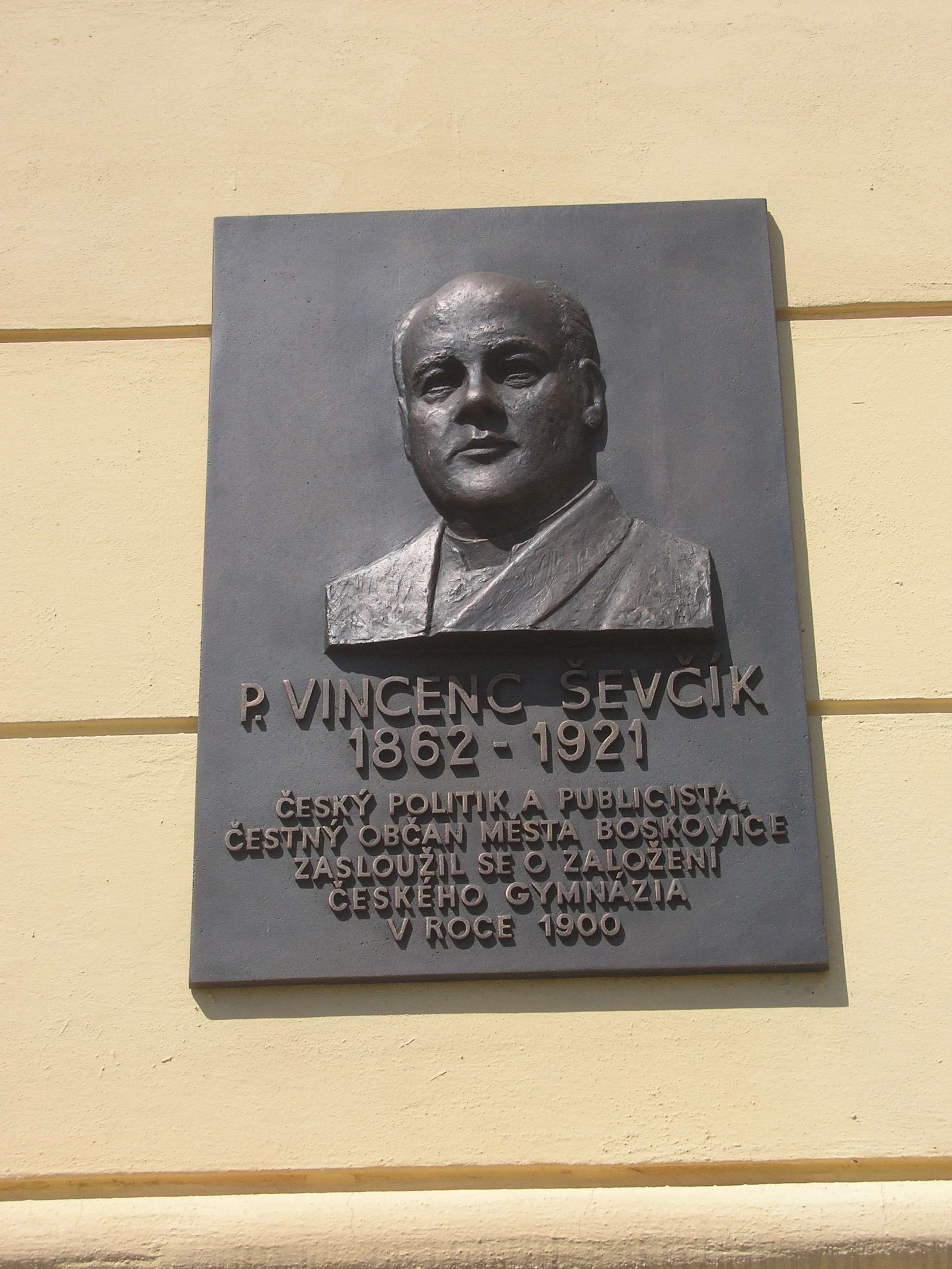 Pomníček P. V. Ševčíkovi v Boskovicích